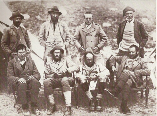 Экспедиция на Эверест 1921 года. Рэбёрн - стоит справа.